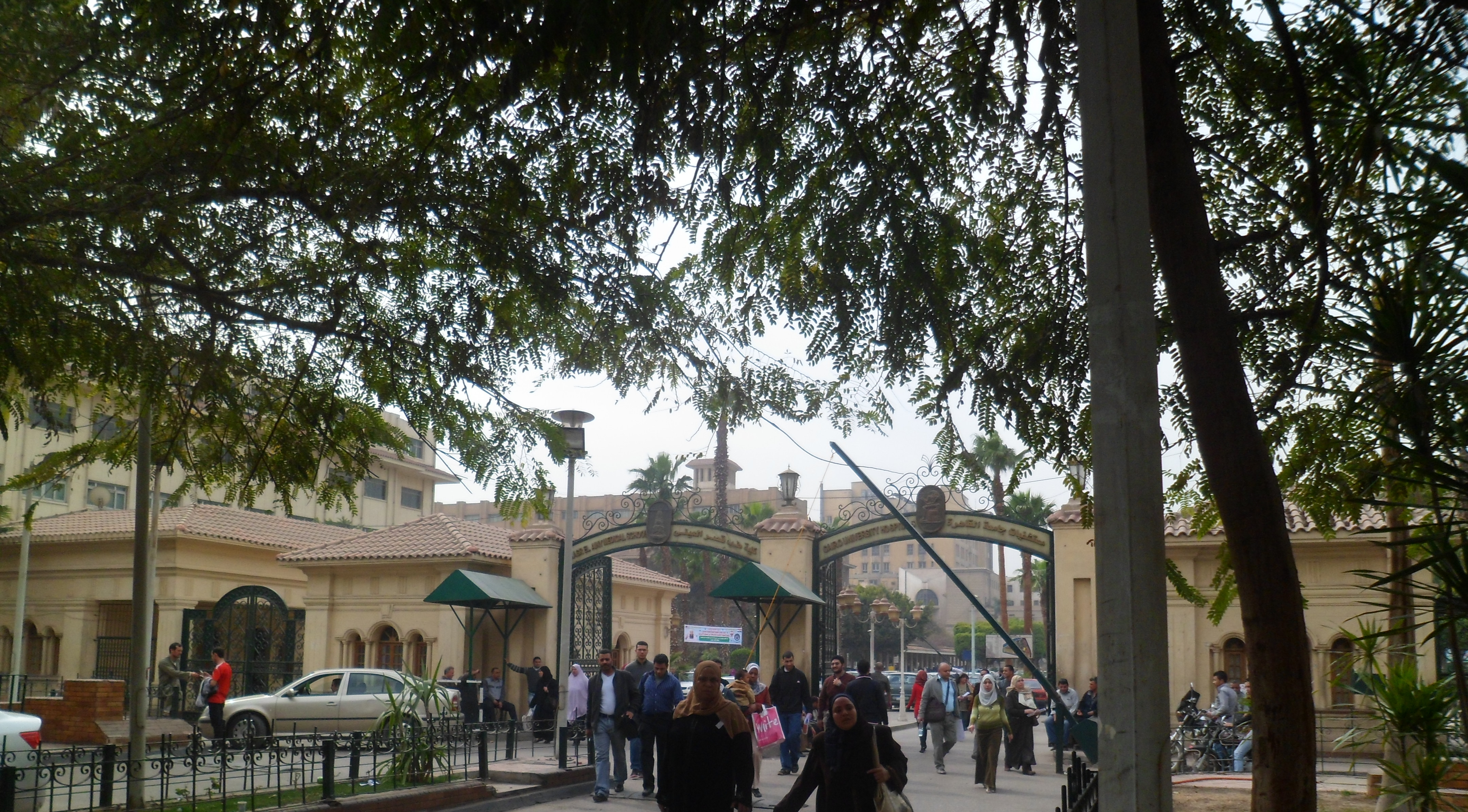 البوابة الرئيسية لكلية طب القصر العيني، القاهرة